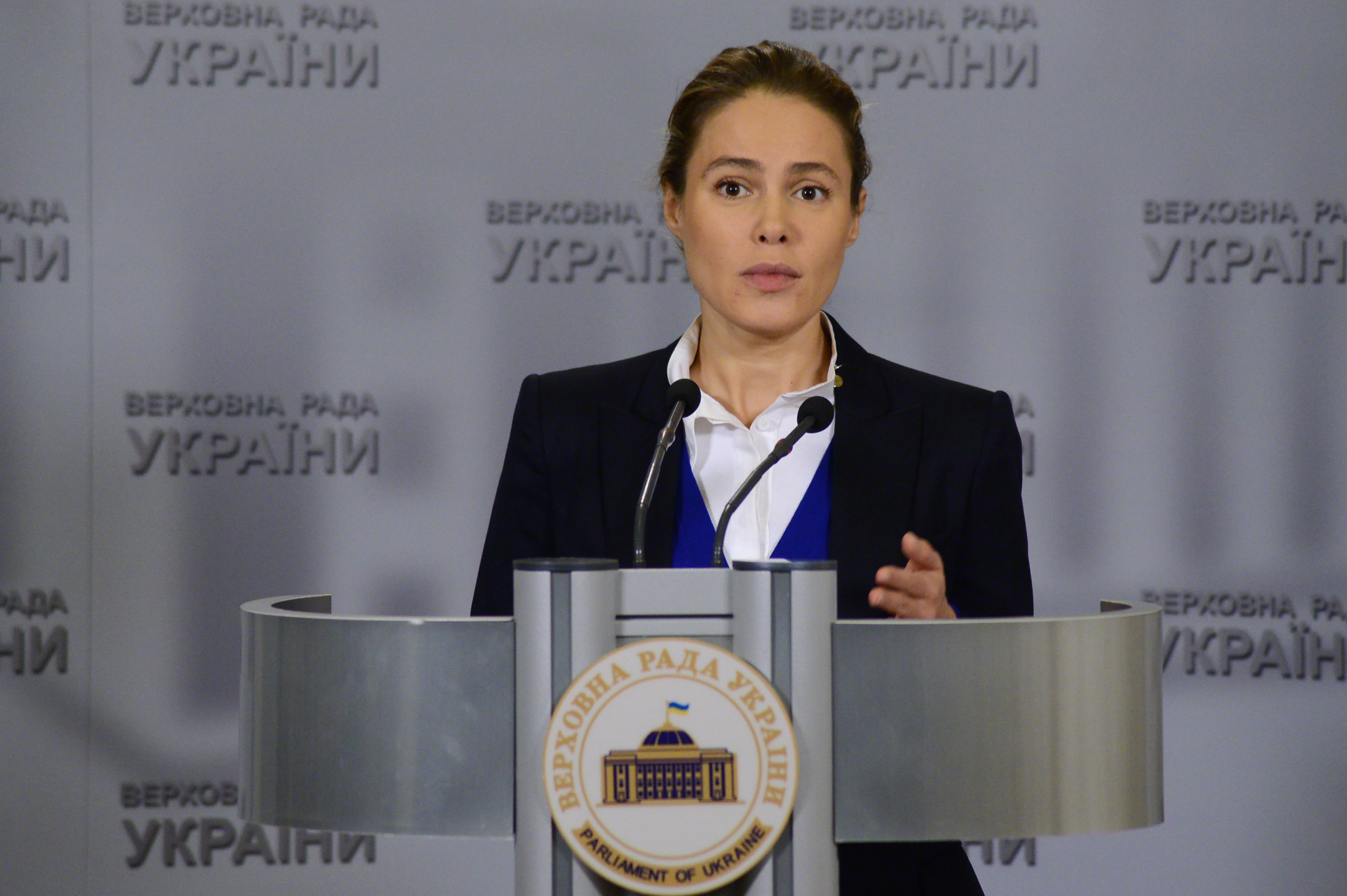 ВЕРХОВНА РАДА УКРАЇНИ 2015 фотограф Вадим Чуприна